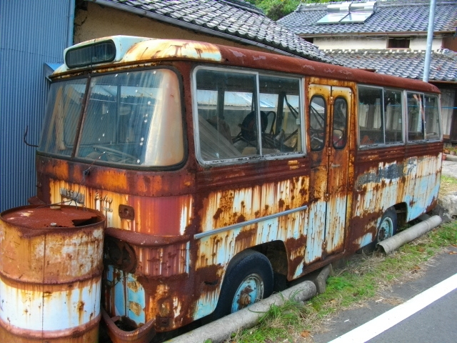 日産エコーGC140の草ヒロである